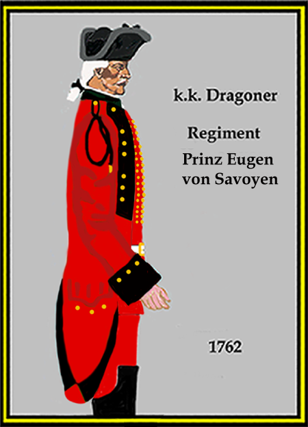 Österreichishes Dragoner-Regiment „Prinz Eugen von Savoyen“ 1762 (Aus: L.& F. Funcken - „L'Uniforme et les Armes des soldats de la guerre en dentelle II“) Castermann (Tournai 1976)